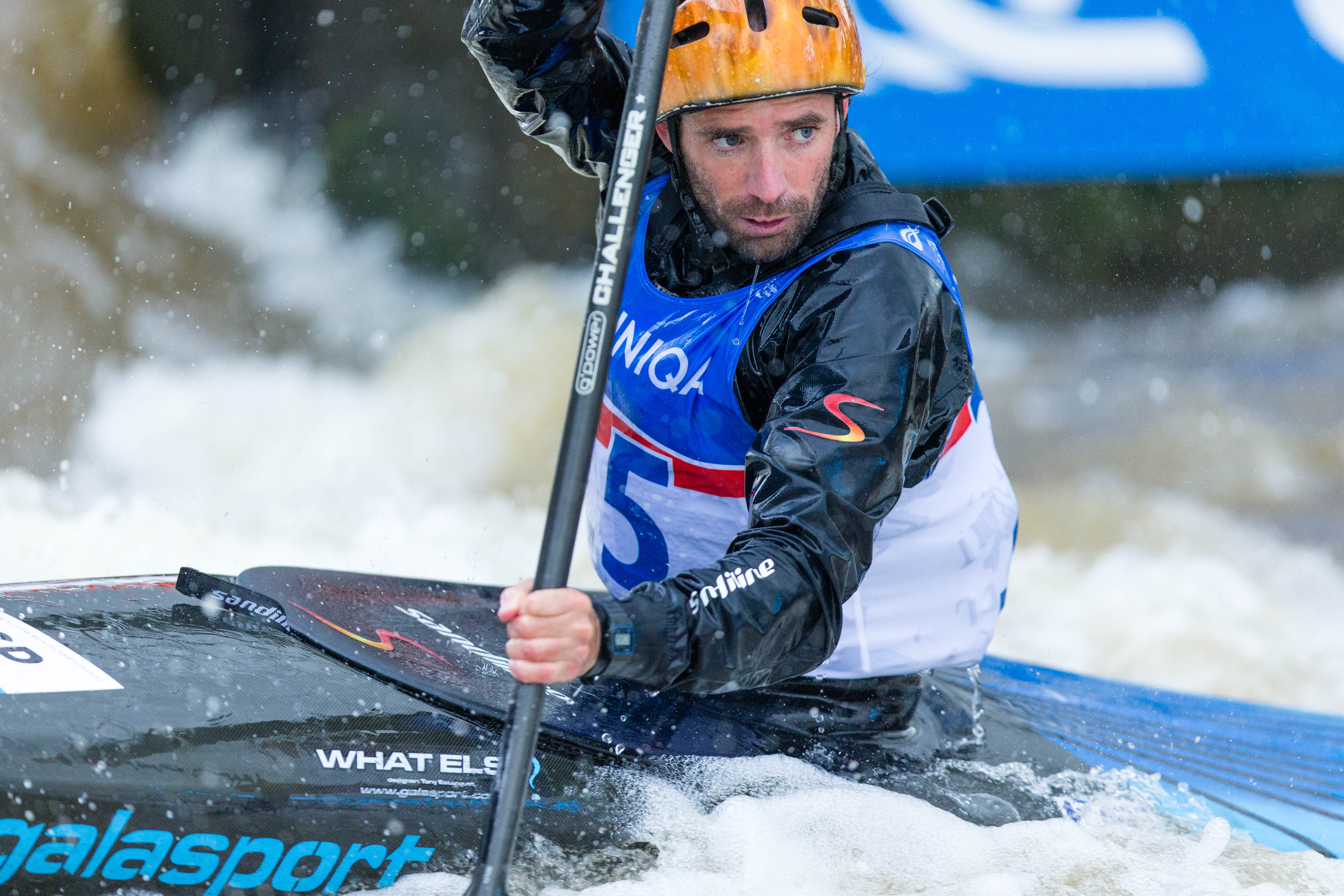 Jon Ergüín